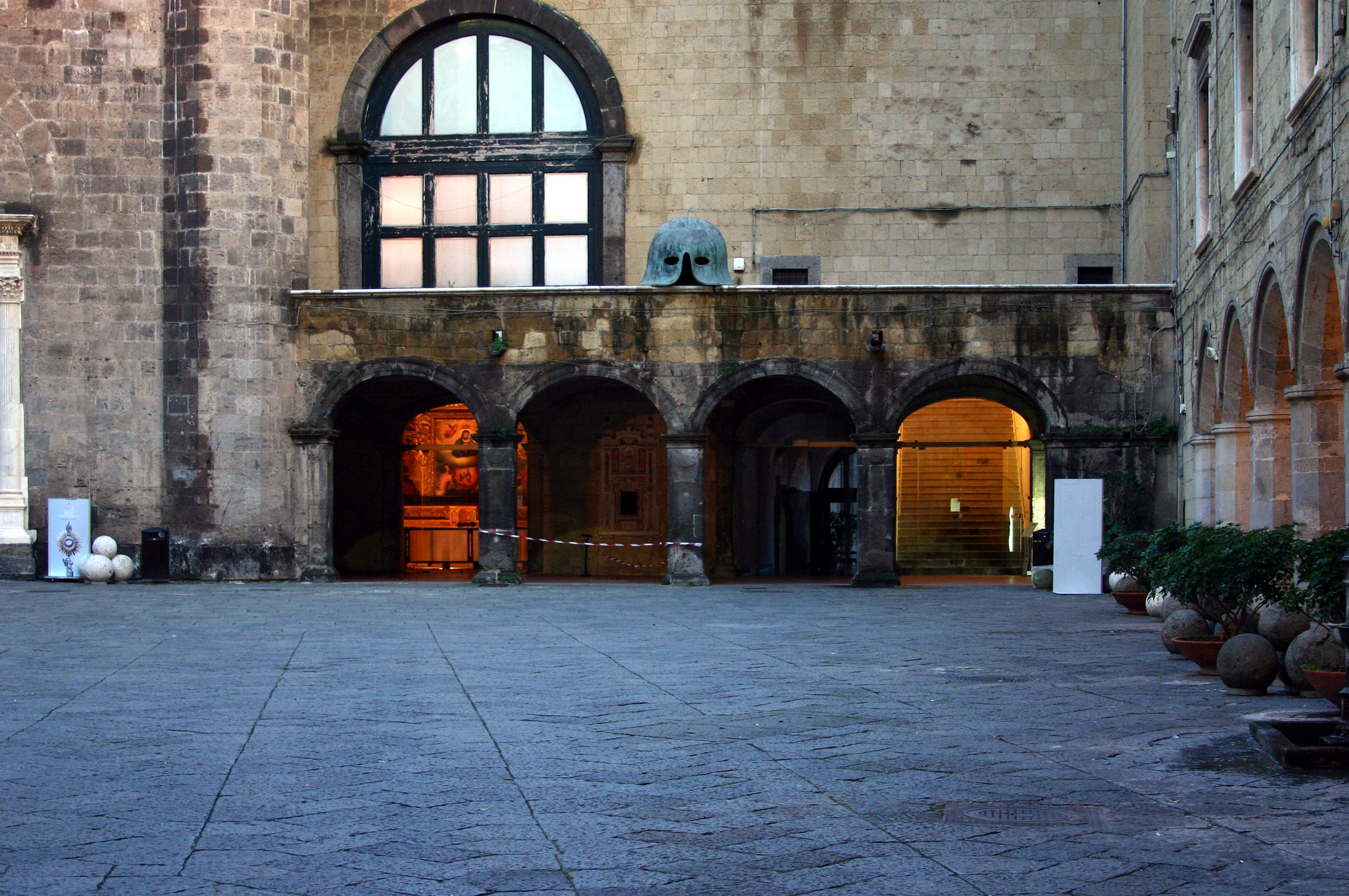 Castel Nuovo - Nápoles